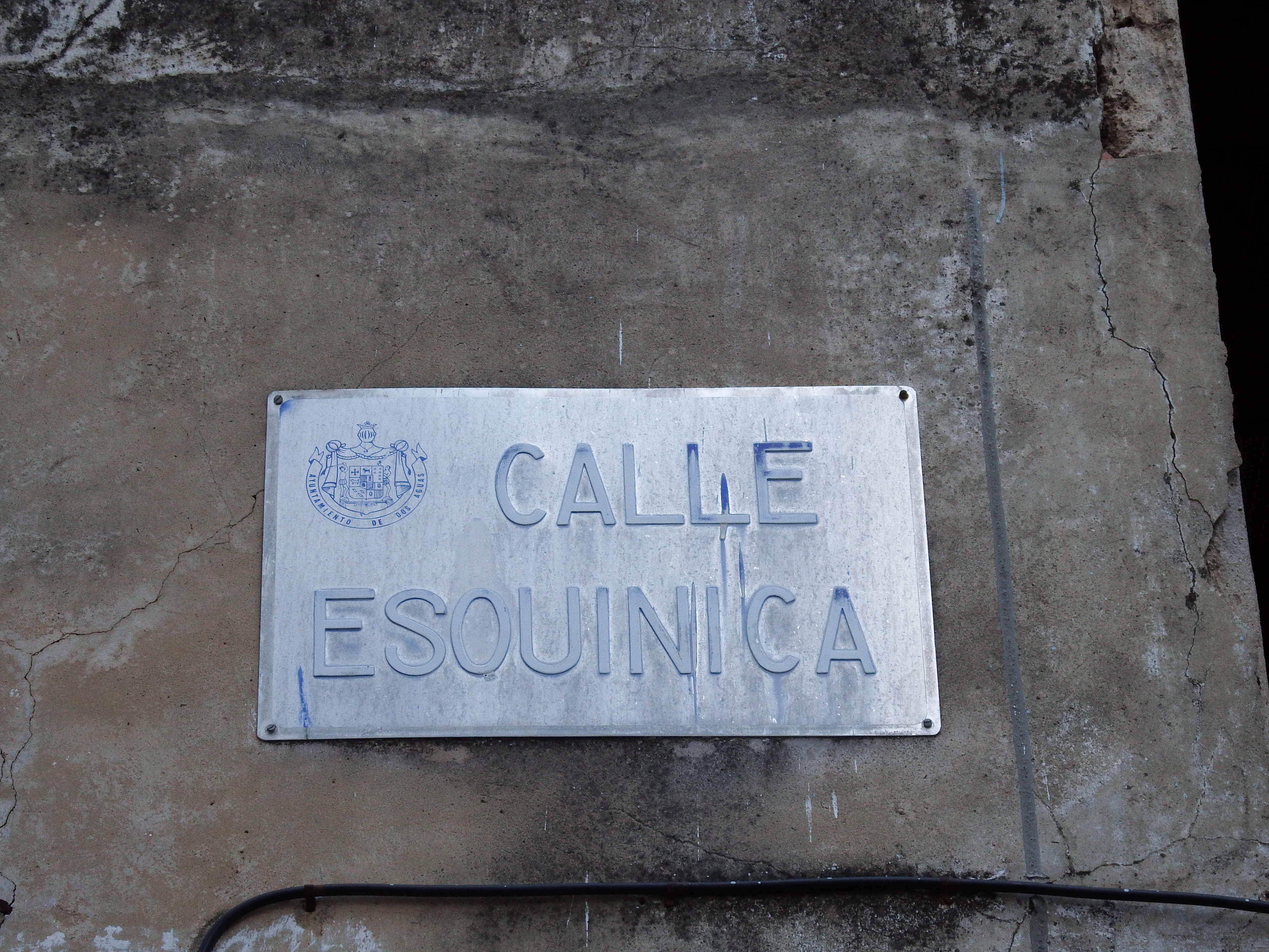 Placa de calle en Dos Aguas